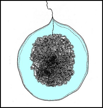 Schéma de bola montrant le fil pelotonné et la glue